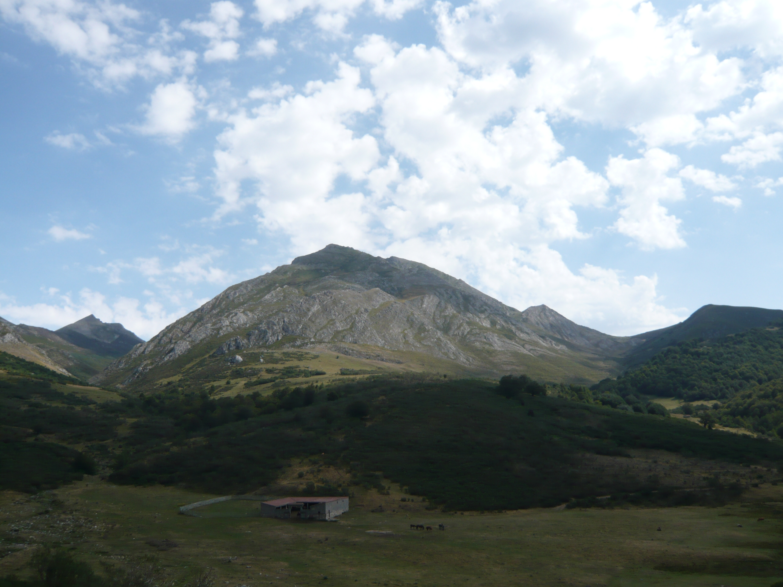 Valle de Valdosín y peña Ten